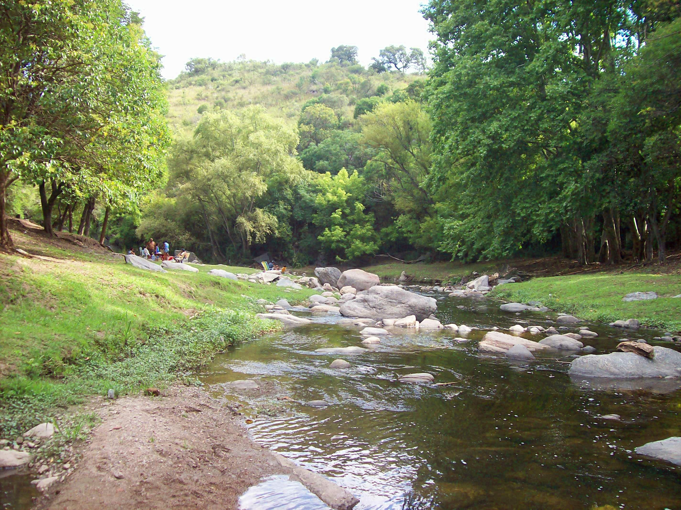 Balneario Yacoana, sobre el río Grande de Punilla (o río San Francisco) al suroeste de Valle Hermoso, en la provincia de Córdoba, Argentina